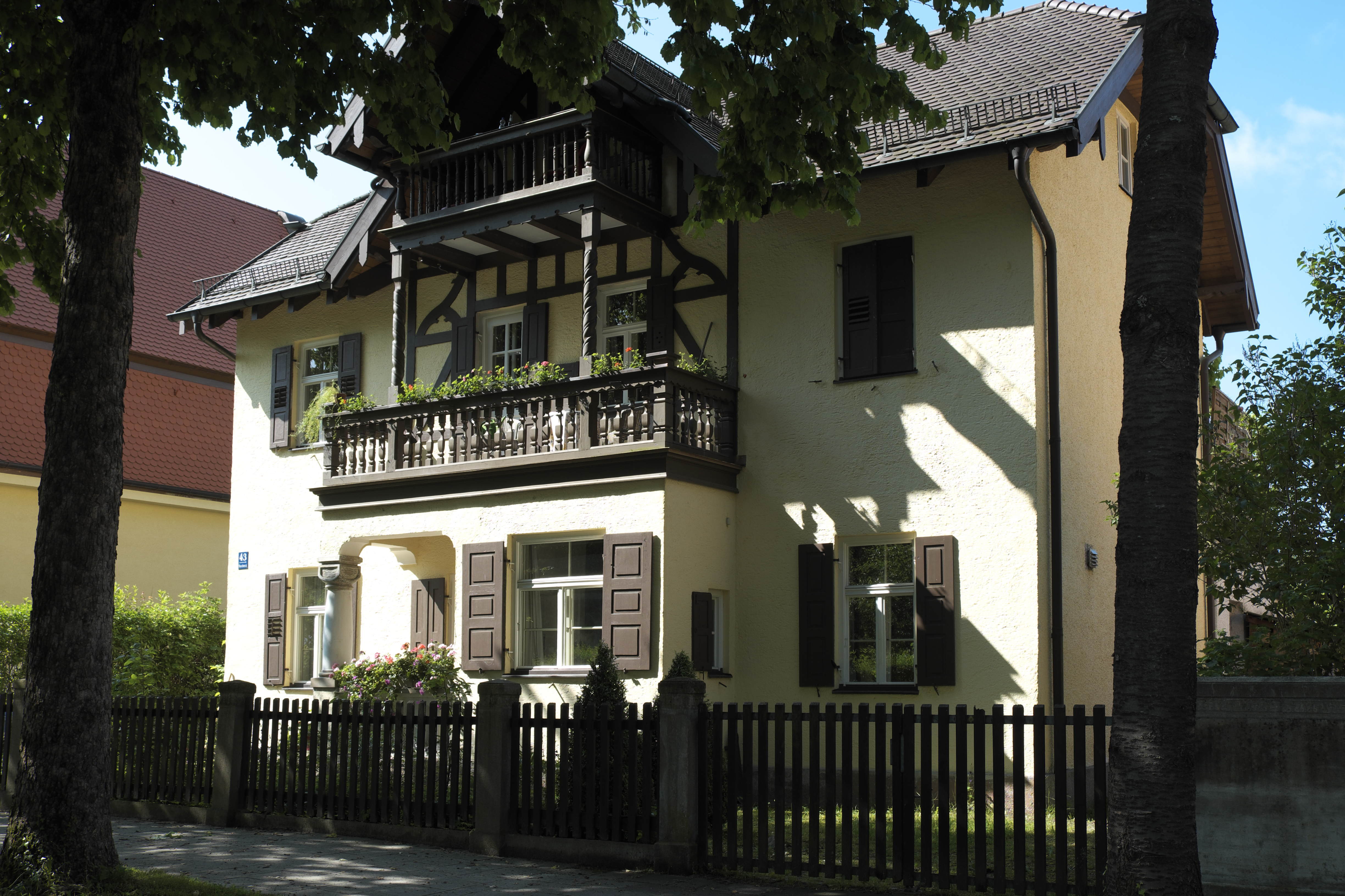 Wohnhaus in der Marschnerstraße 43 in Obermenzing im Stadtbezirk Pasing-Obermenzing in München (Bayern/Deutschland)